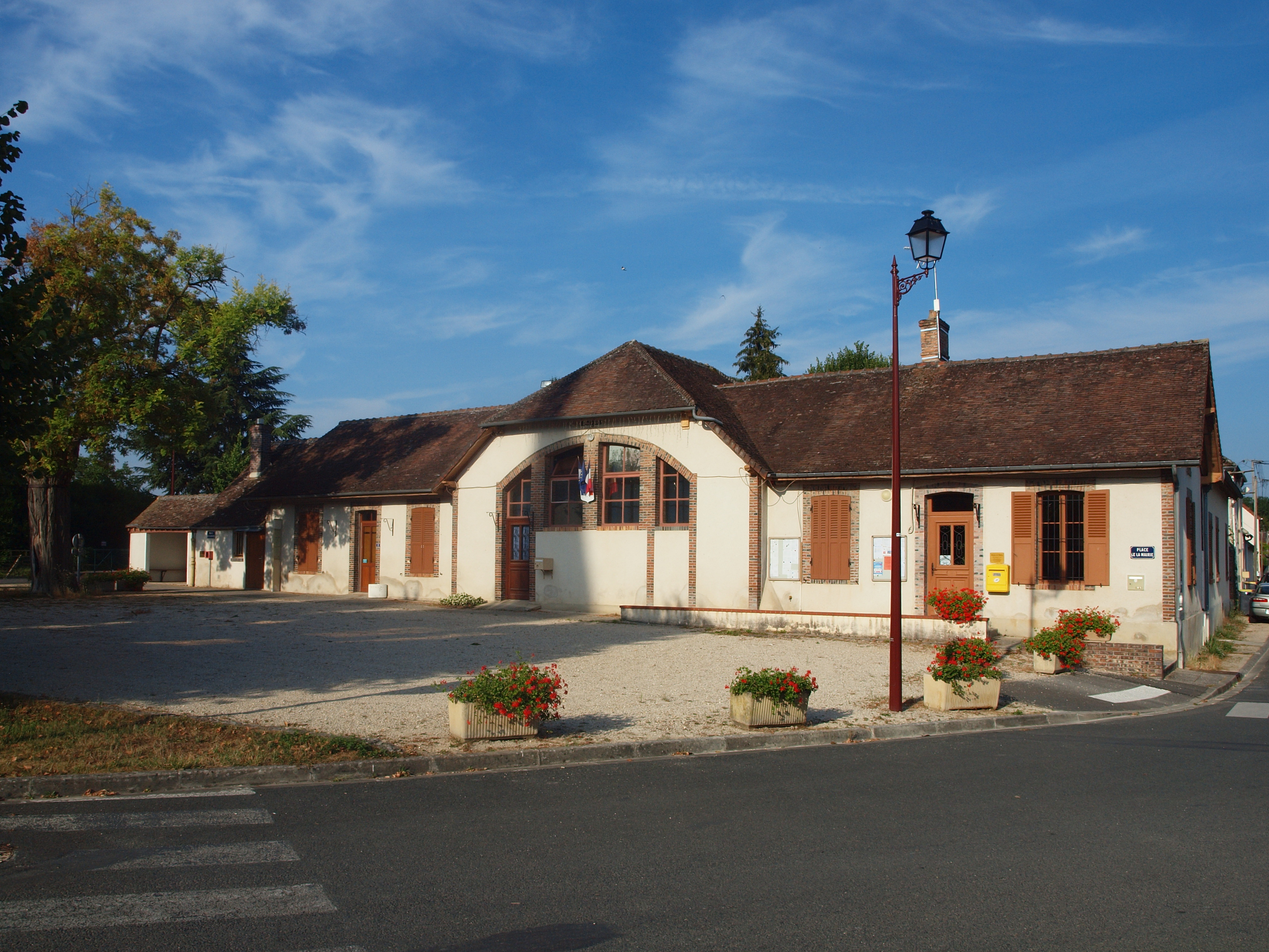 Mairie de Balloy (Seine-et-Marne, France)